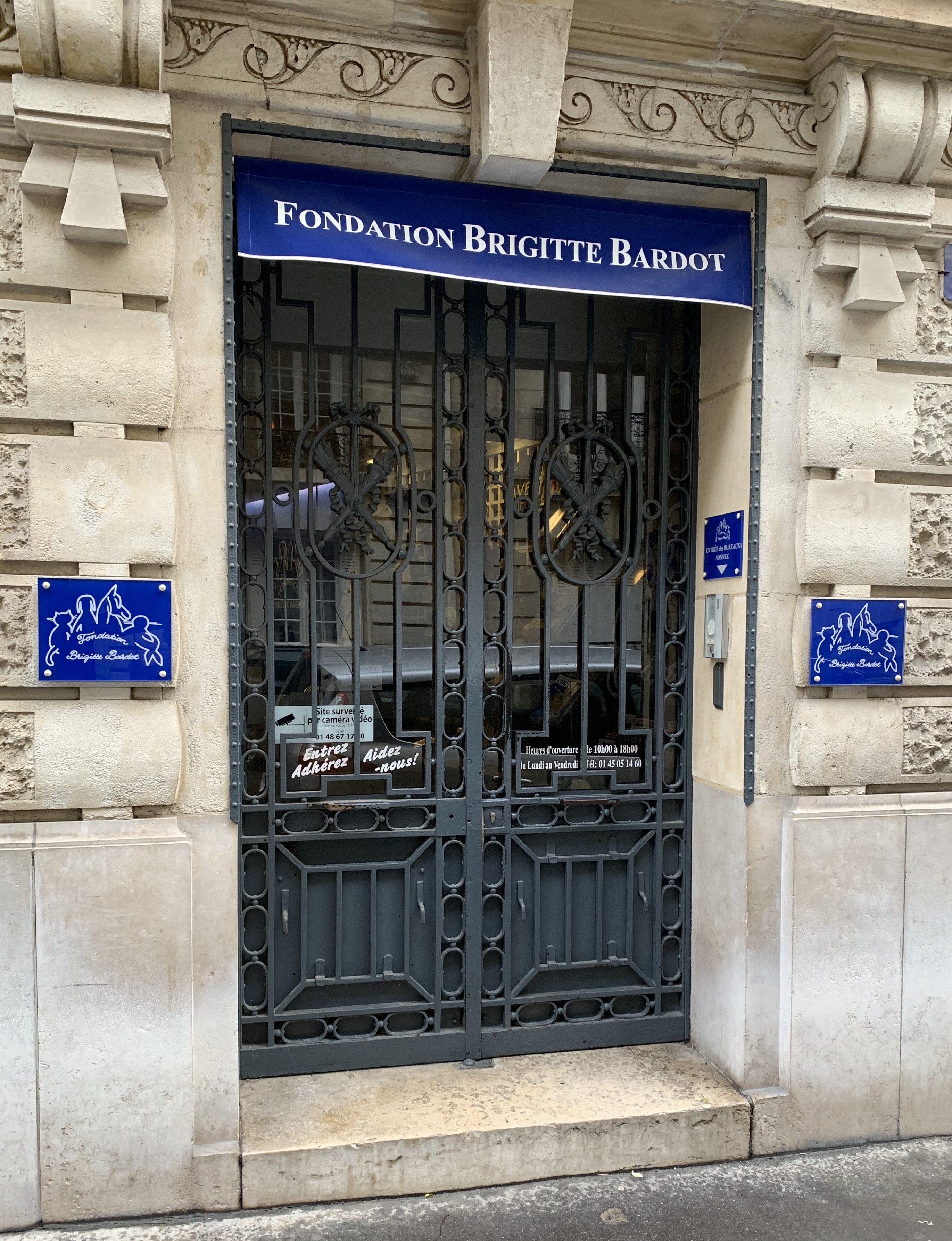 Prédio da Fundação Brigitte Bardot em Paris, França